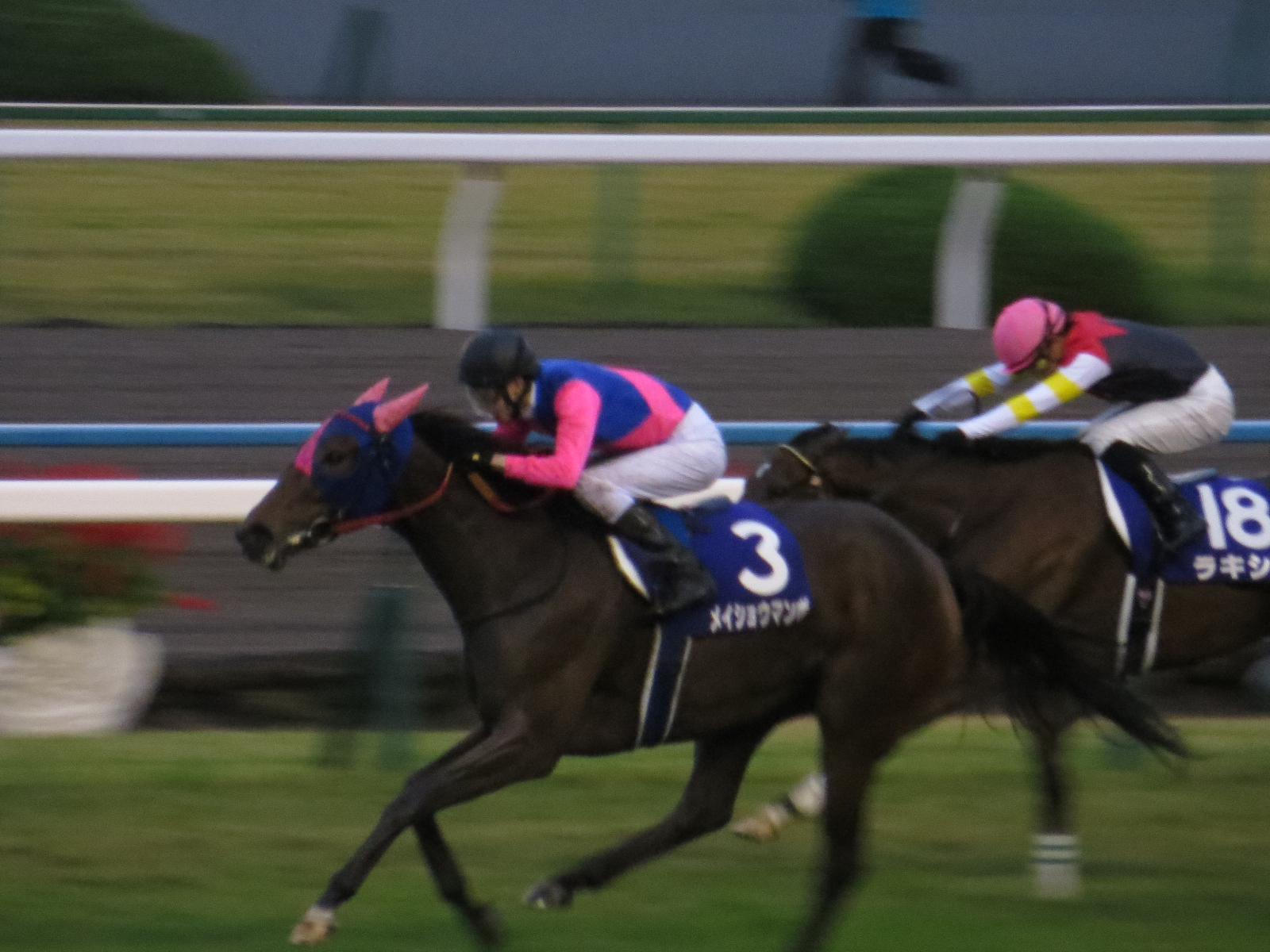 もひとつIntermission画像を 1着：メイショウマンボ（武幸四郎） / Meisho Mambo (Koshiro Take) 2着：ラキシス （川田将雅）/ Lachesis (Yuga Kawada) 3着：アロマティコ （三浦皇成）/ Aromatico (Kosei Miura) 雨は嫌ぽ・・・( ´ω｀)